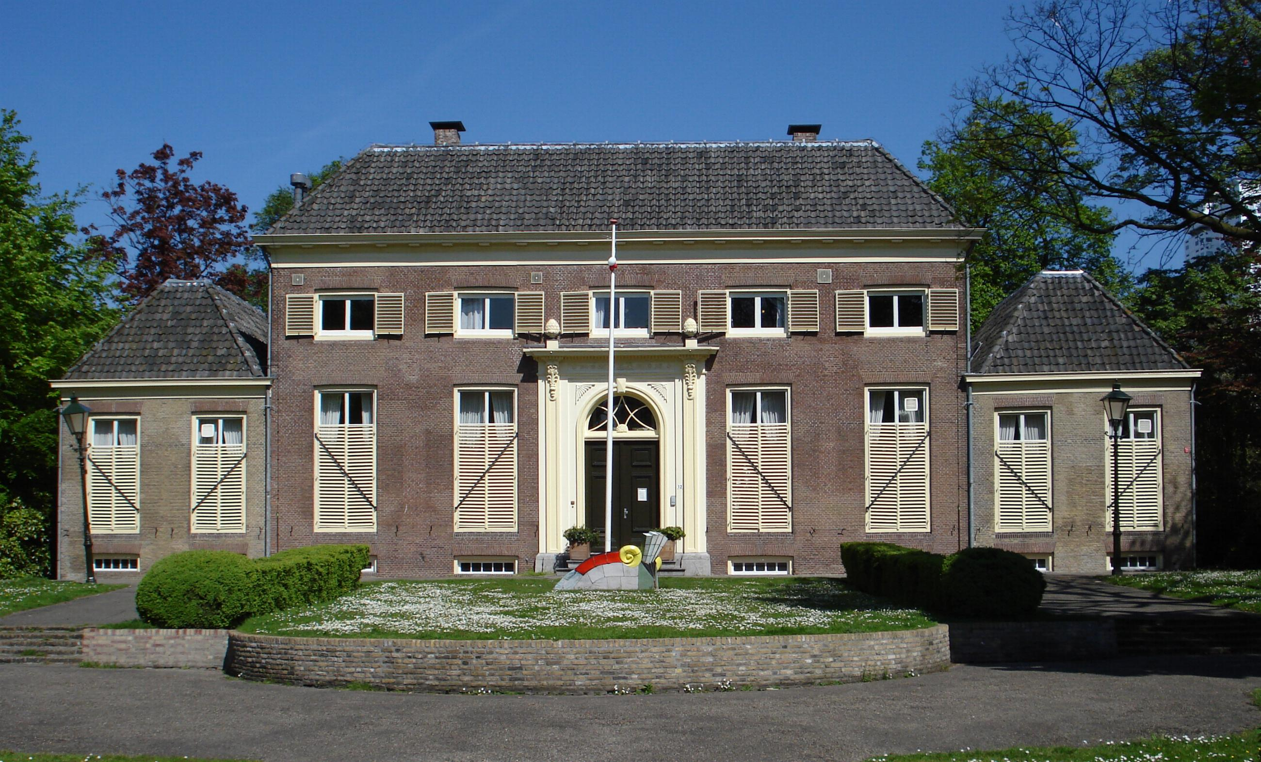 Rotterdam, Baden Powell laan 12. Rijksmonument.